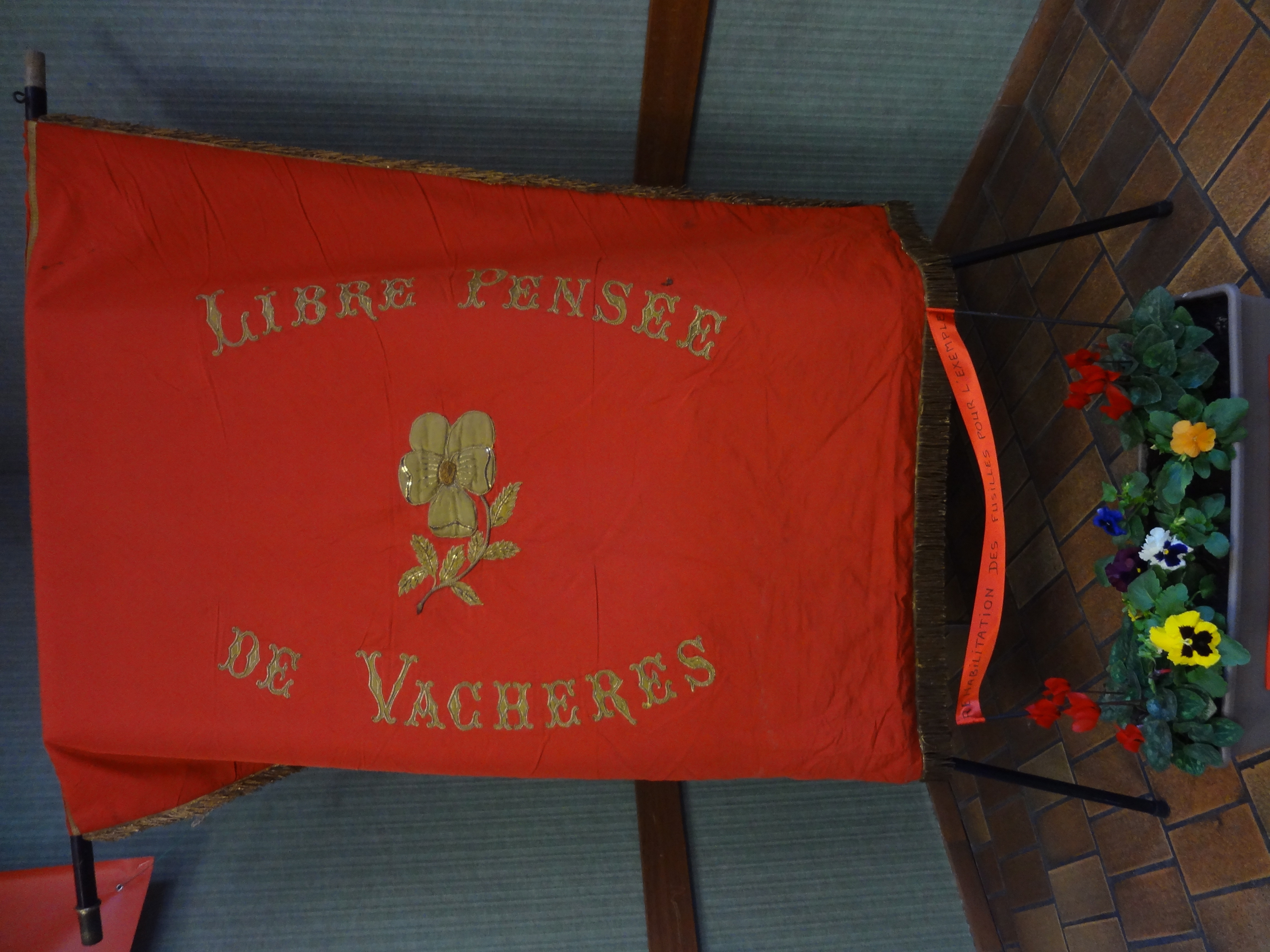 Drapeau de la Libre pensée de Vachères